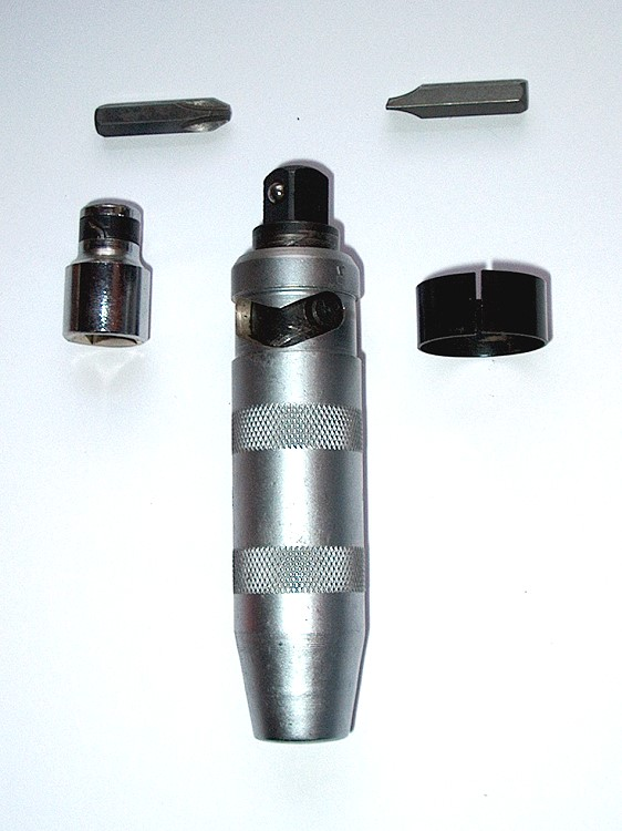 Mechanischer Schlagschrauber. 1/2 Zoll Antrieb. Abdeckung abgenommen, mit Adapter von 1/2" auf 6-Kant für Bits, oben 2 Schraub-Bits Kreuzschlitz und Schlitz